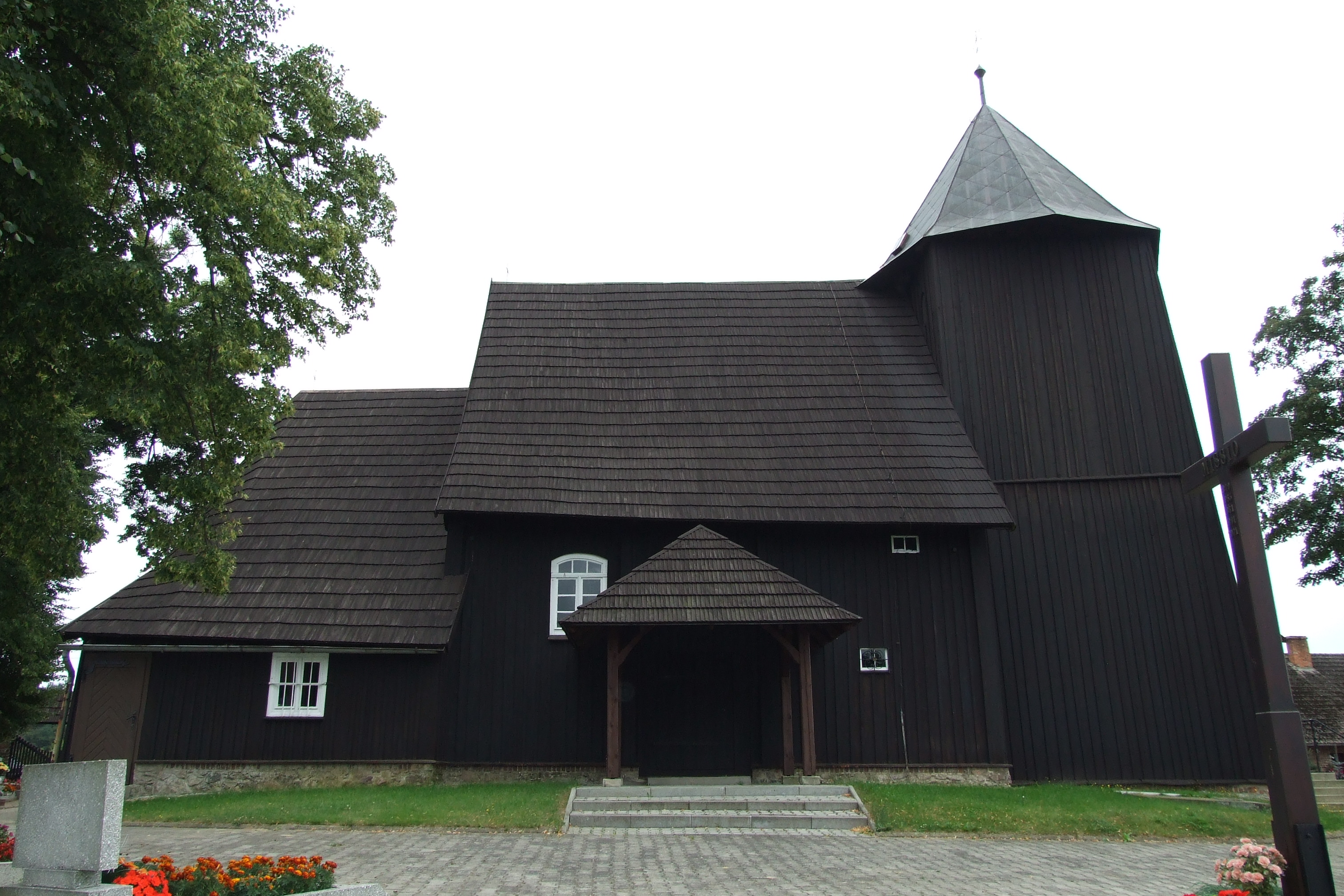 Kościół św. Marii Magdaleny w Boroszowie